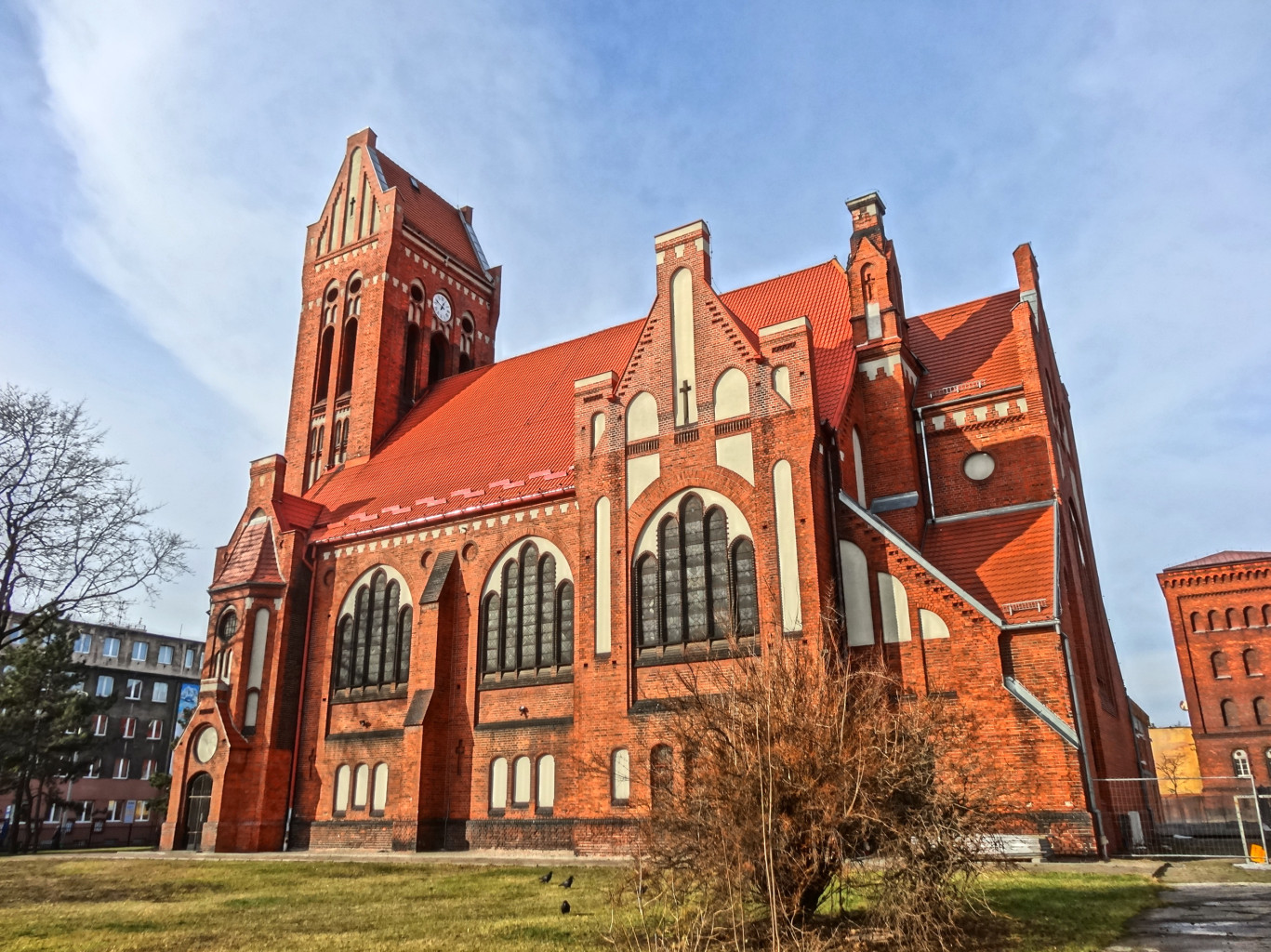 Kościół ewangelicko-augsburski p.w. Zbawiciela, 1896-1897, Bydgoszcz, ul. Warszawska